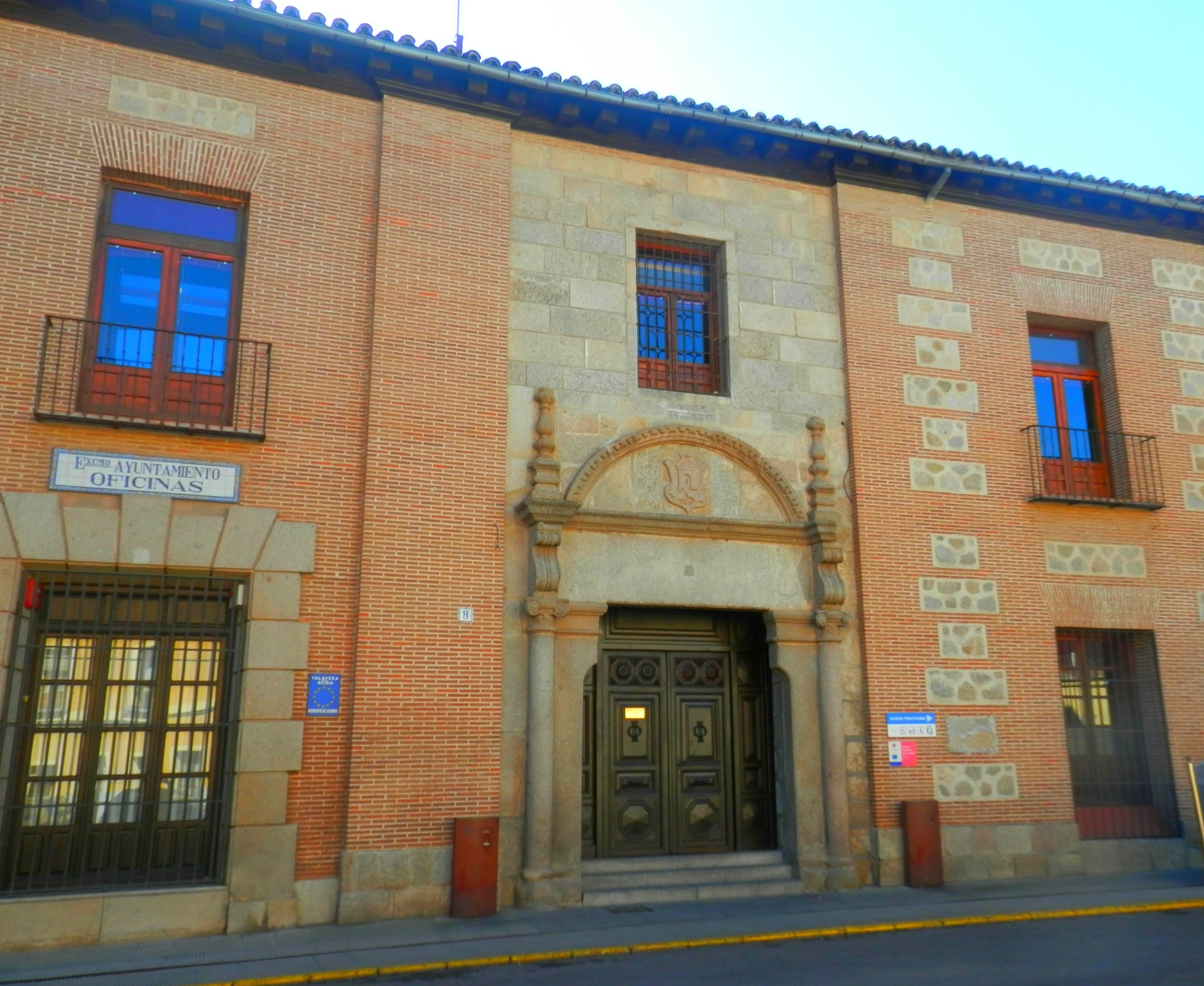 Ayuntamiento de la ciudad de Talavera